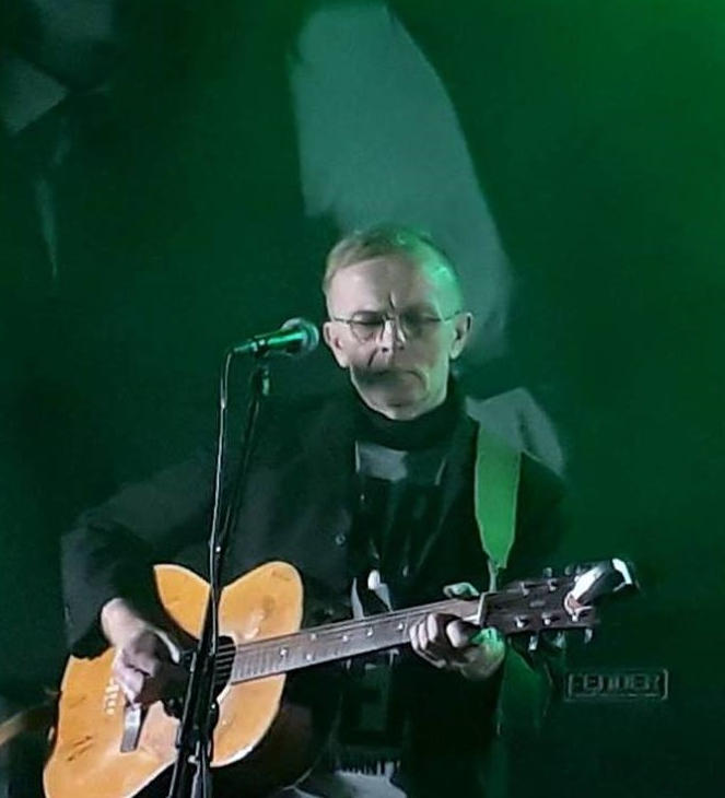 Aarni Varjonen 2017